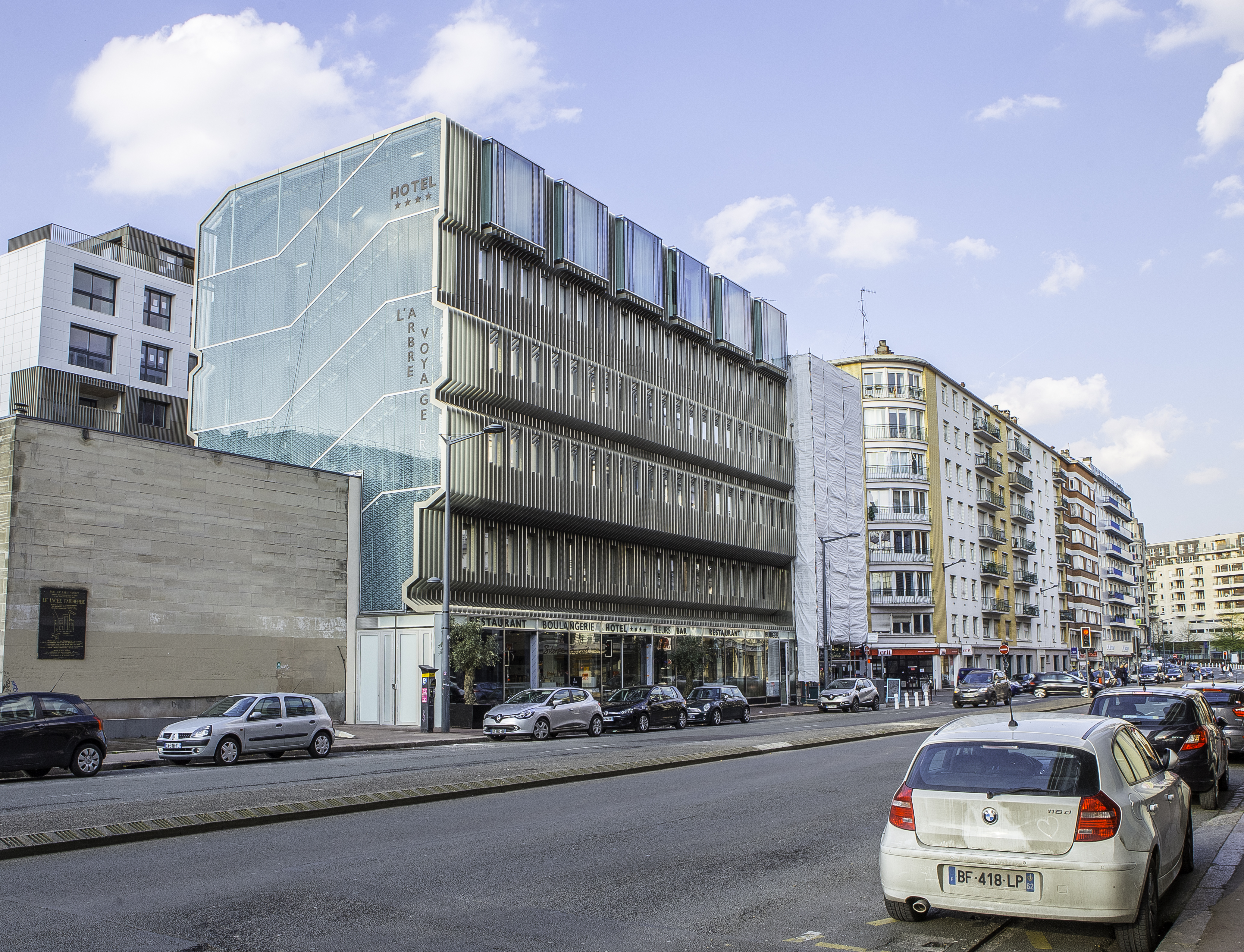 Hôtel et restaurants implantés Boulevard Carnot en lieu et place de l'ancien Consulat Général de Pologne.